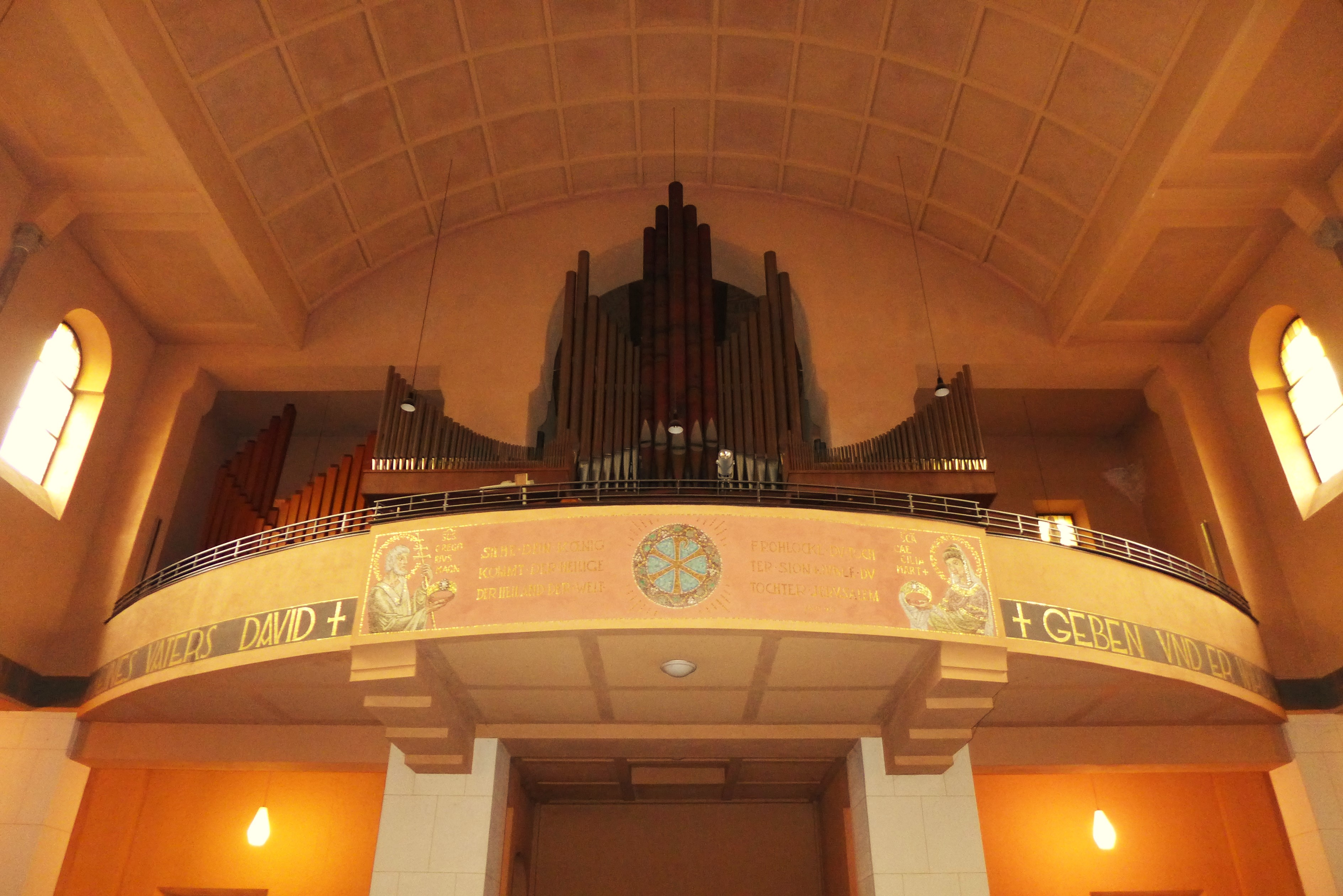 Christkönig-Kirche (Saarbrücken), Orgelempore